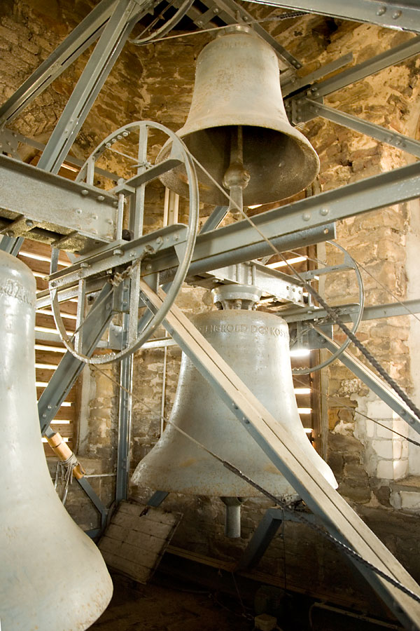 Glockenstuhl der St. Januarius Kirche in Sprockhövel